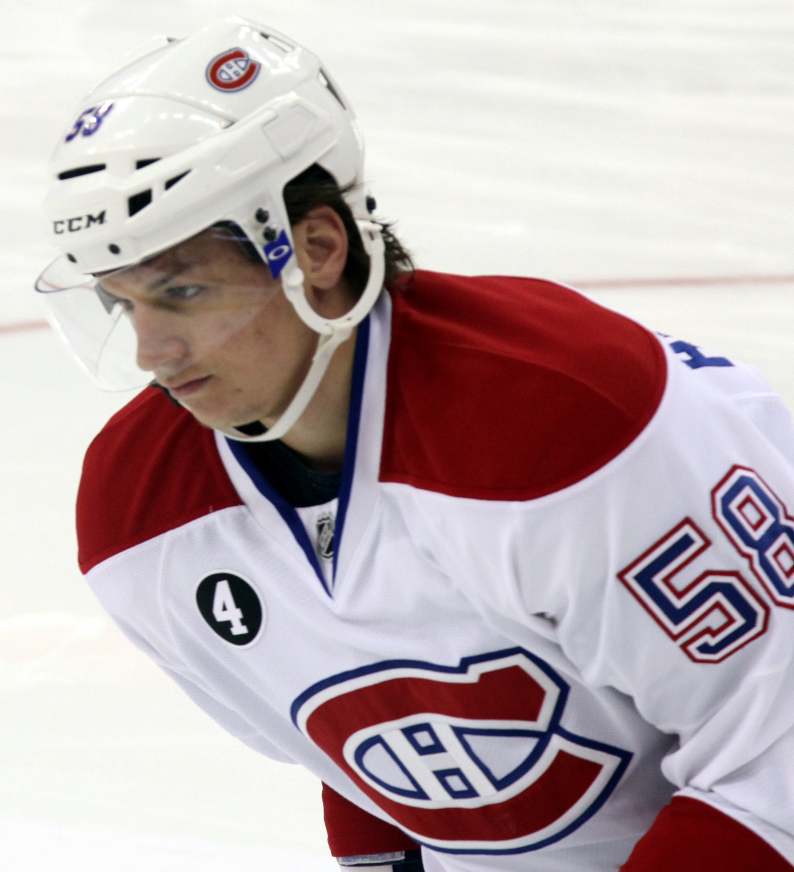 Sven Andrighetto in January 2015.